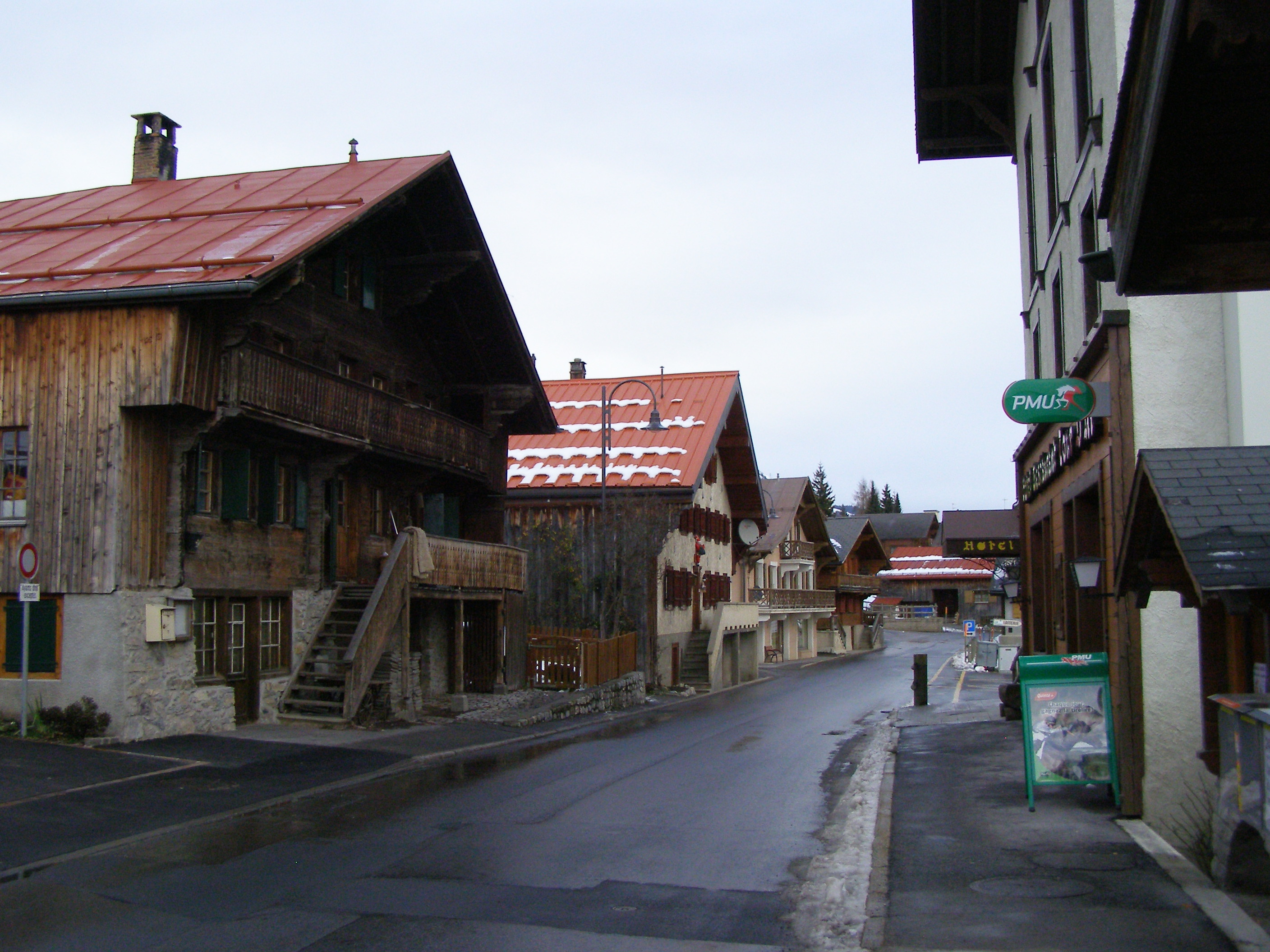 Leysin, Šveits, vaade asula vanas osas